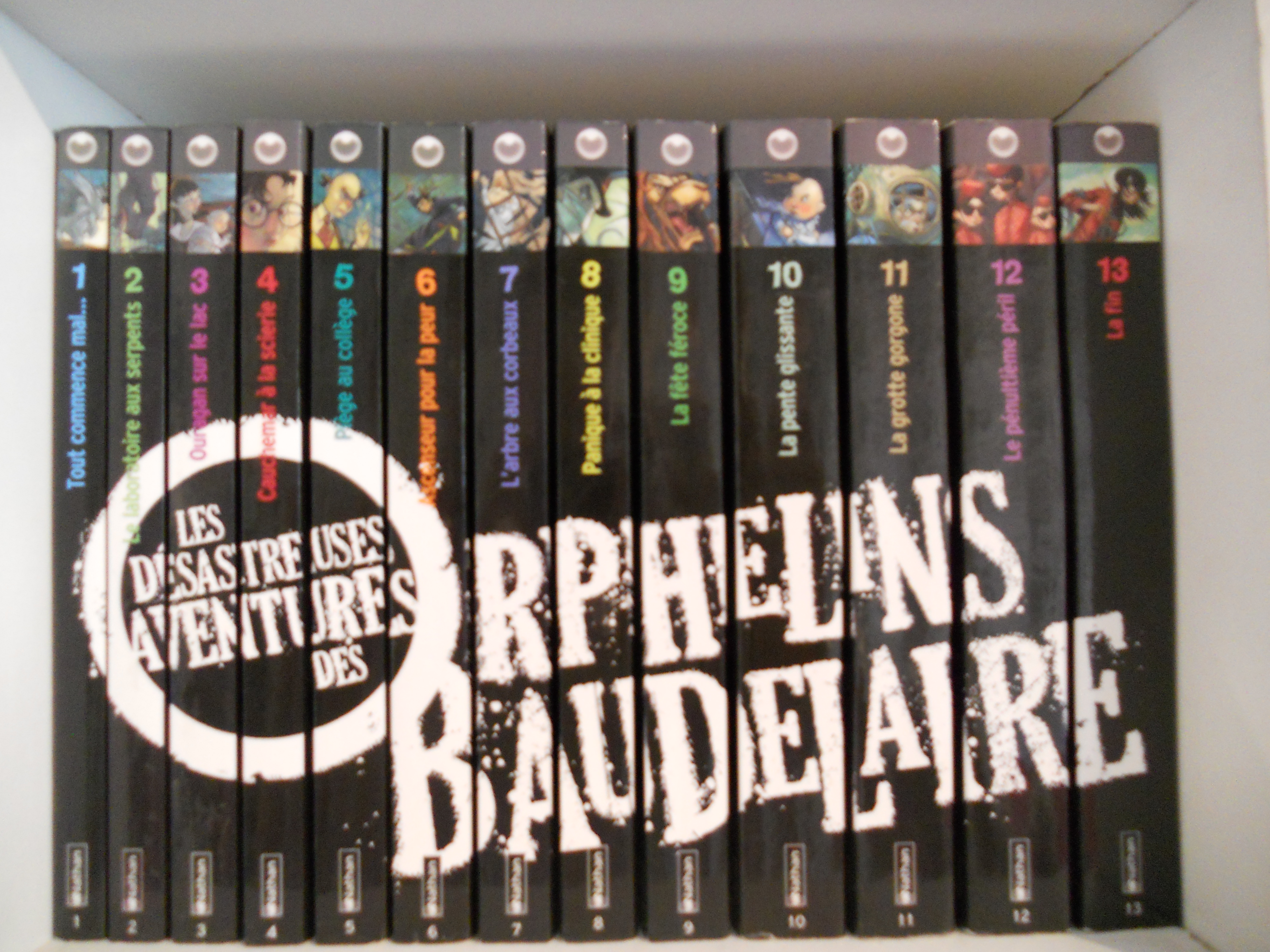 Photographie des dos de la série de livres écrite par Daniel Handler: Les désastreuses aventures des orphelins Baudelaire